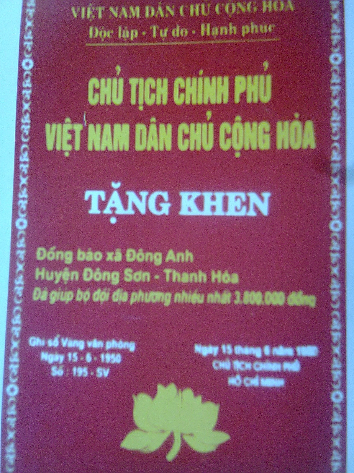 Lá cờ Chủ tịch Hồ Chí Minh tặng xã Đông Anh ngày 15-6-1950 do có thành tích cao nhất (3.800.000 đồng) trong việc giúp bộ đội địa phương. Xã Đông Anh lúc thời điểm đó hiện nay là các xã Đông Anh, Đông Thịnh, Đông Xuân, xóm Nghĩa (xã Đông Tiến) và một phần thị trấn Rừng Thông.